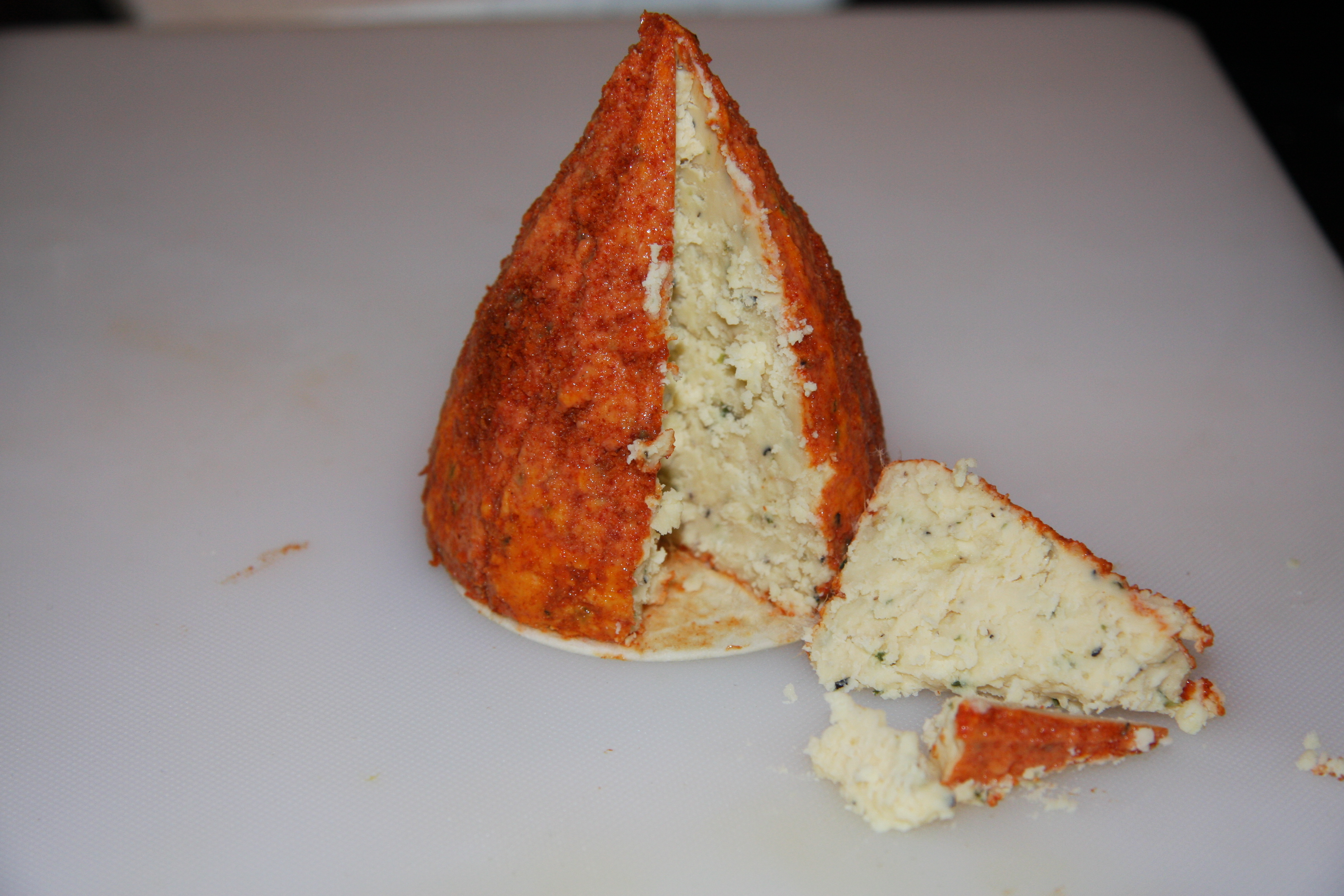 Boulette d'Avesnes